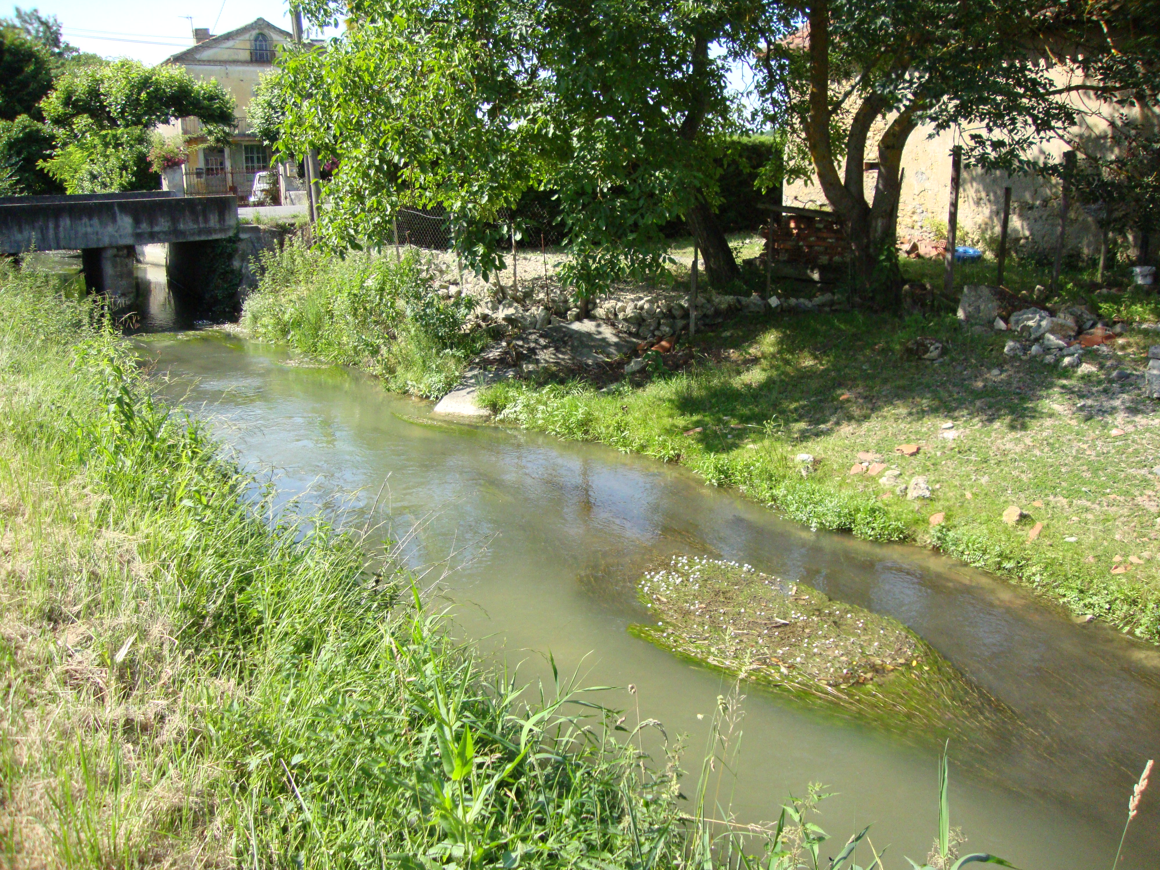 Auriébat (Hautes-Pyrénées, Fr) Canal d'Alaric.